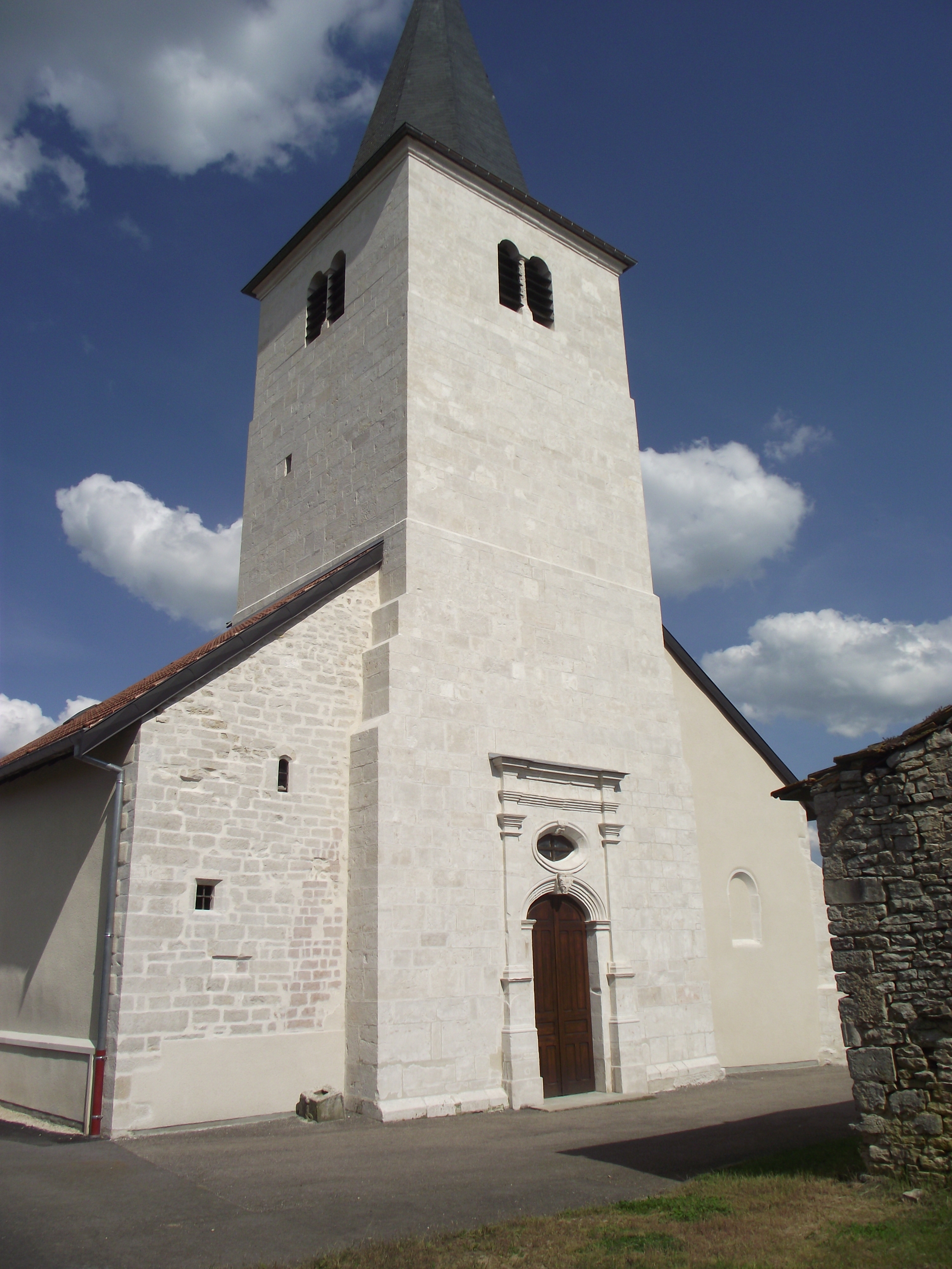 Eglise de Punerot, l'entrée.